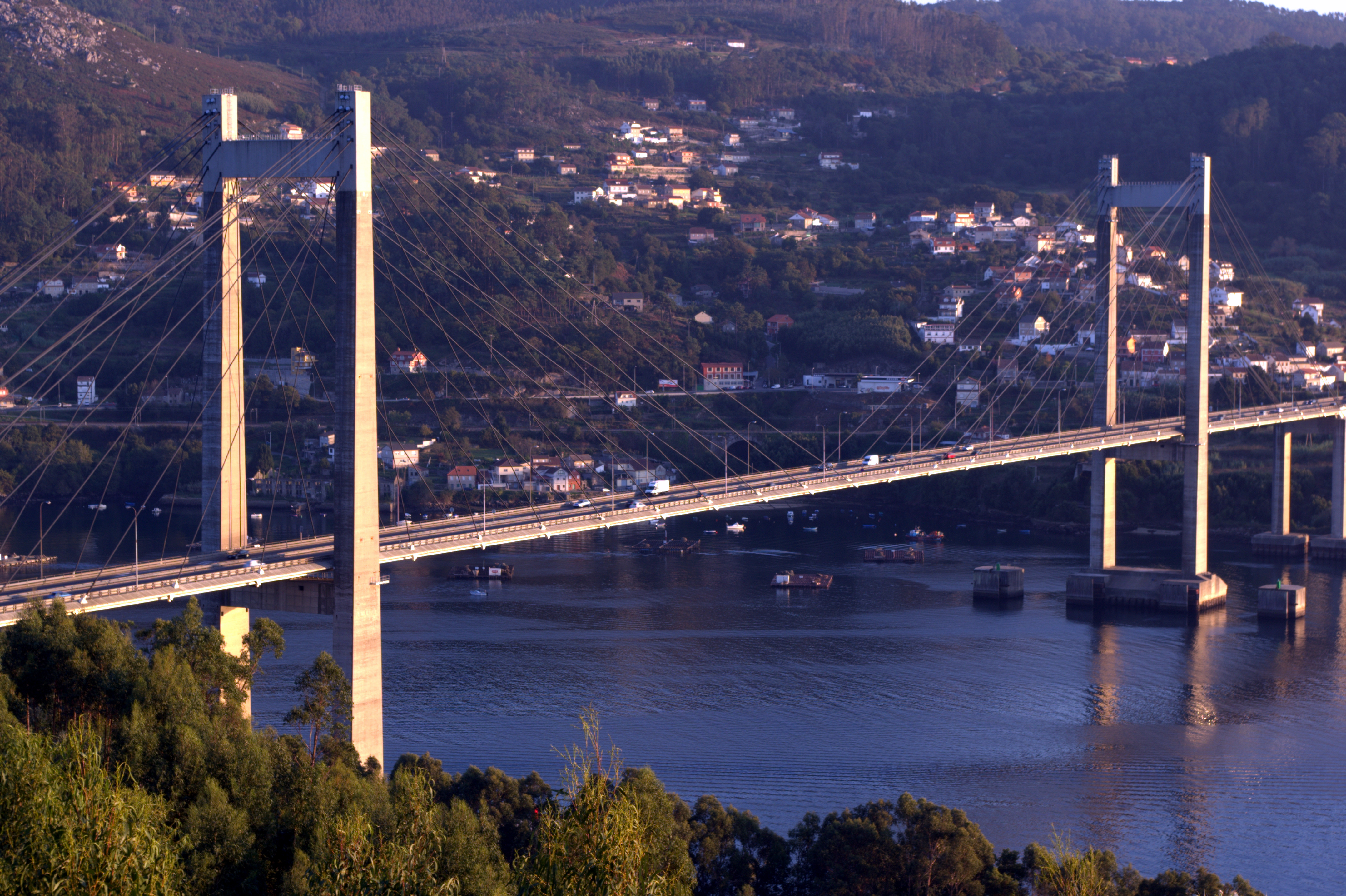 Vista completa